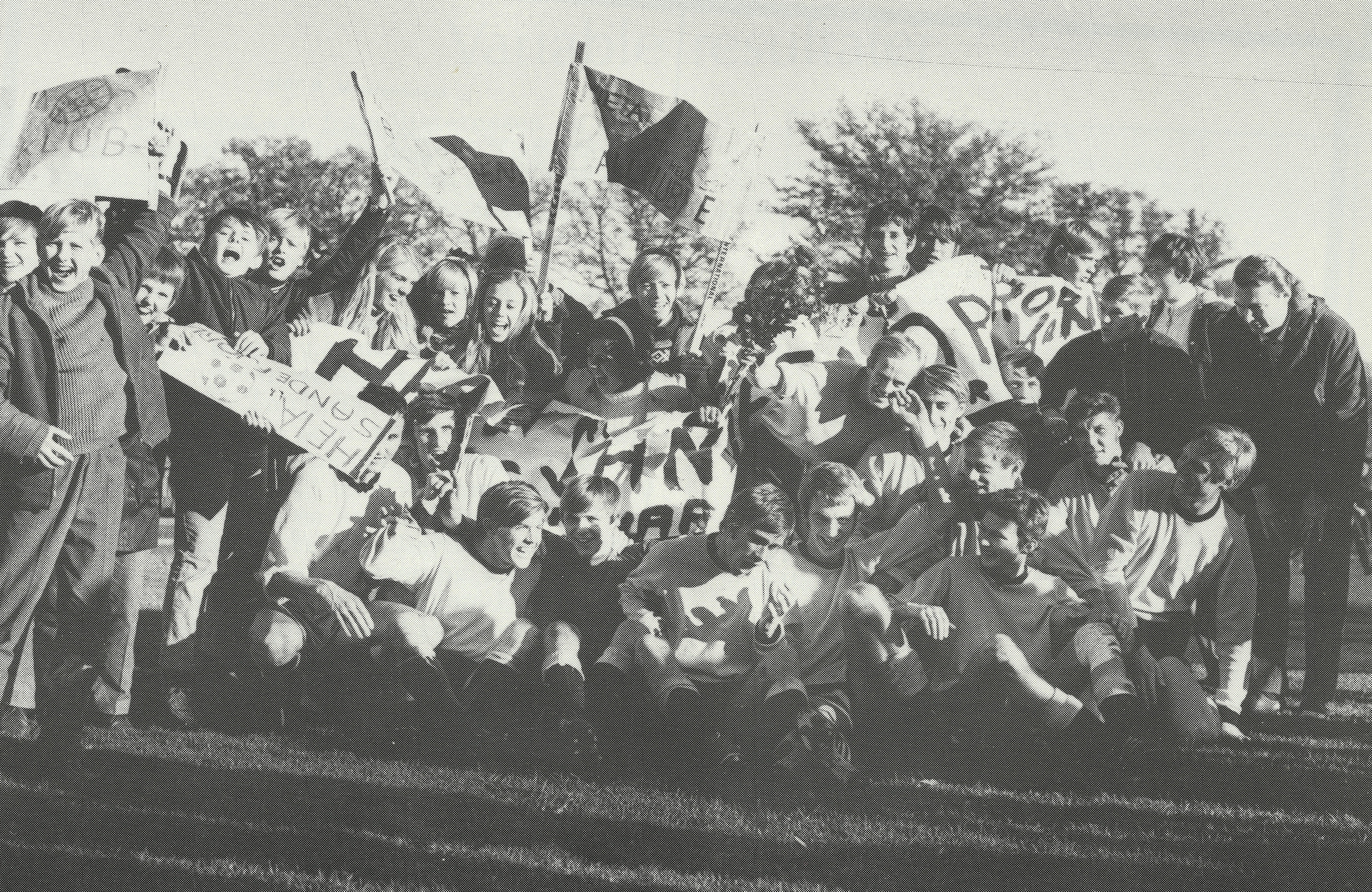 Sandefjord Ballklubb rykker opp til 3.divisjon etter å ha slått Moss 2-1 i Lystlunden i Horten.